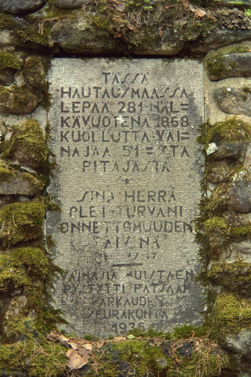 Varkausmäen pohjoispuolella olevan joukkohaudan muistokivi.